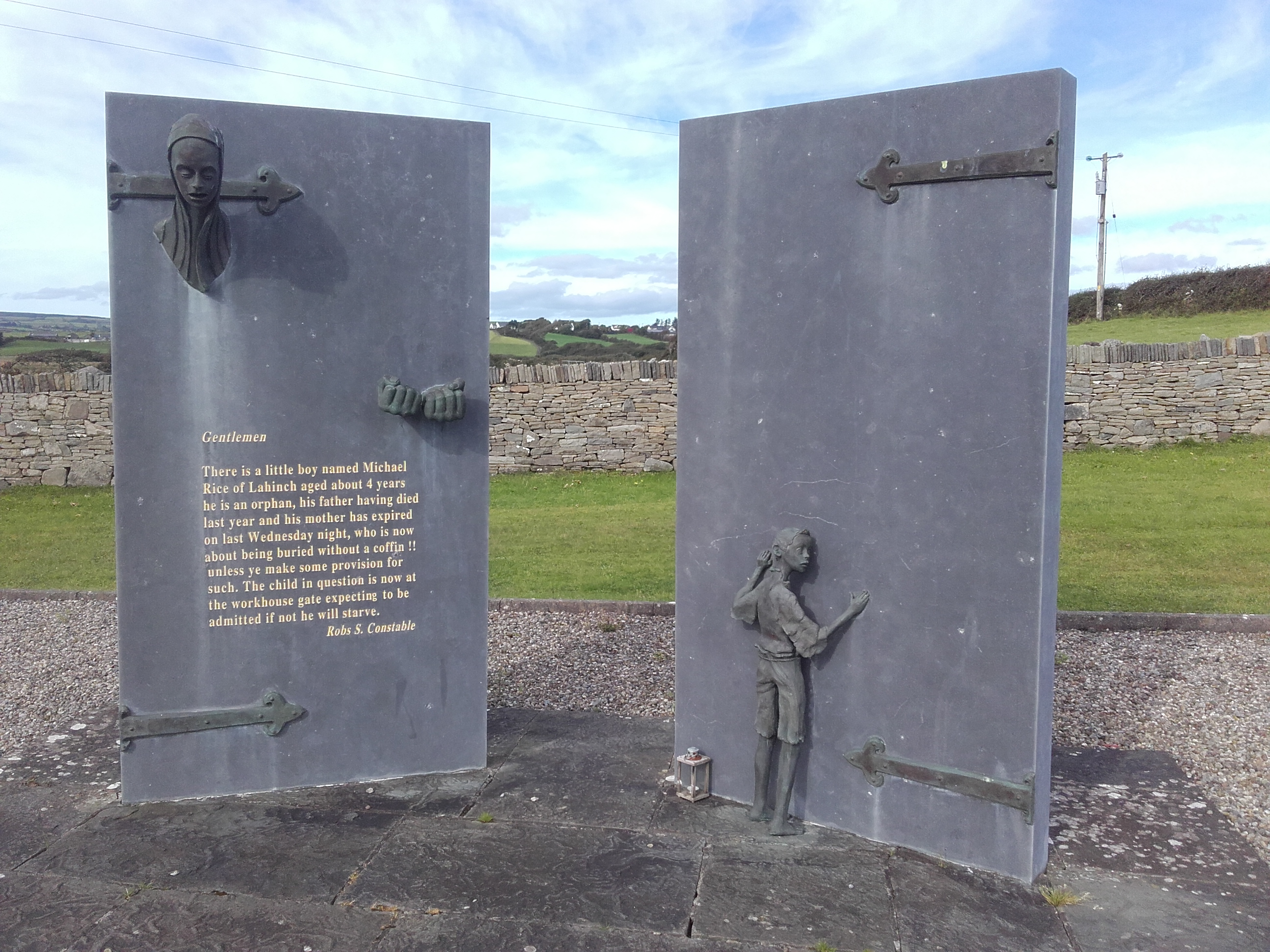 Monumento conmemorativo das vítimas da Gran Fame irlandesa na estrada entre Lahinch e Ennistymon, no condado de Clare.